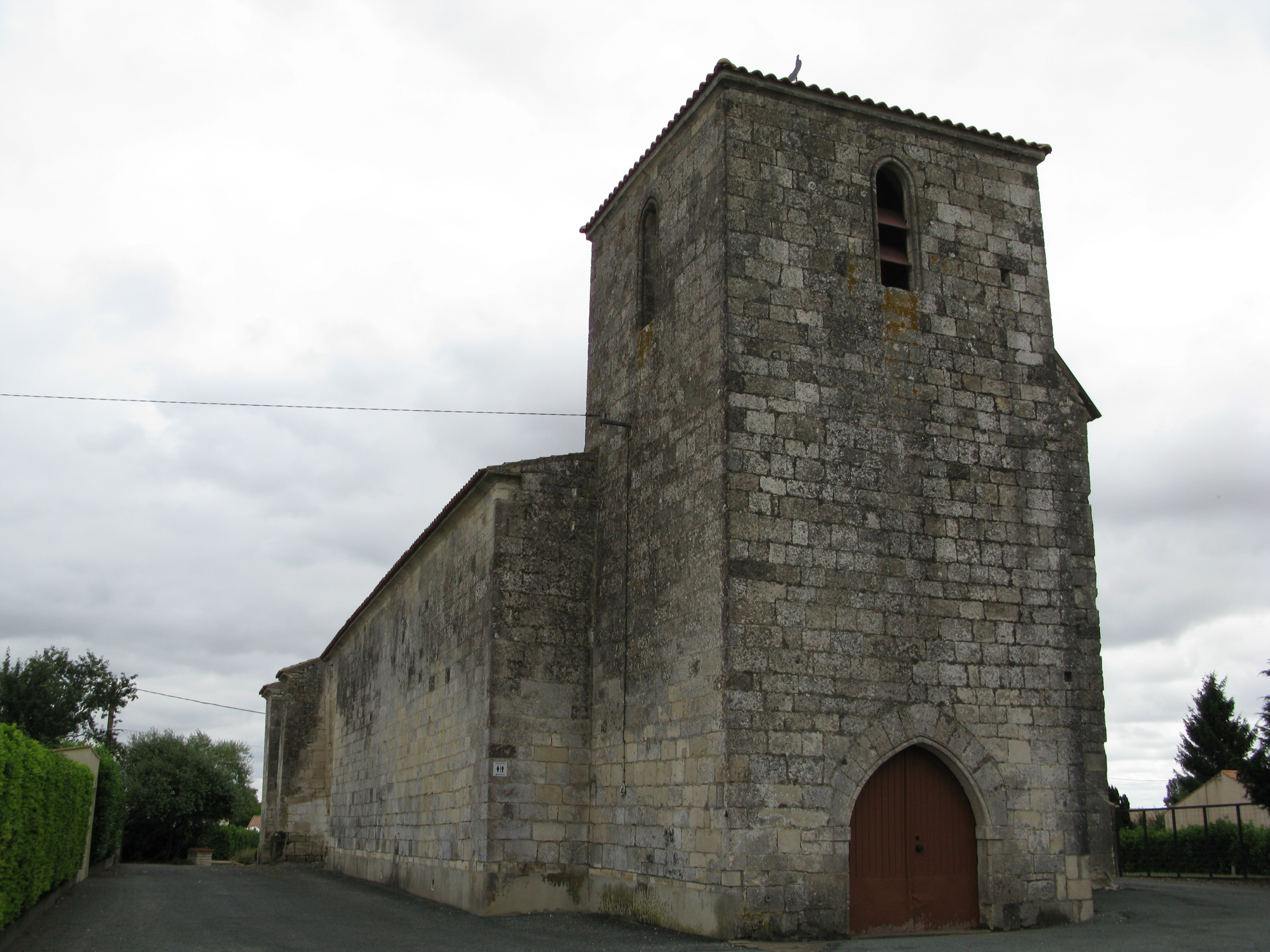 L'église de Faye-sur-Ardin